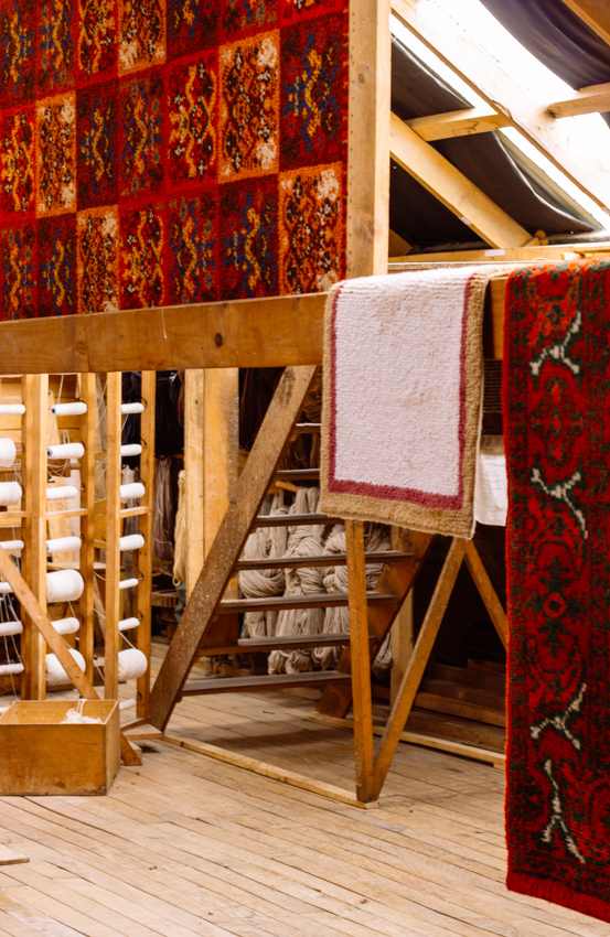 Fábrica de Alfombras Puyuhuapi, creada entre 1940 y 1945 por Walter Hopperdietzel.